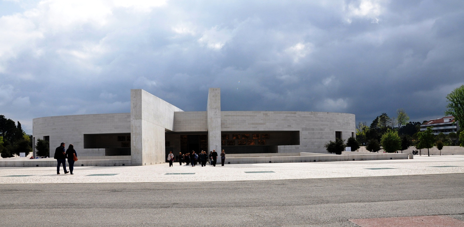 Igreja da Santissima Trindade - Kirche der Heiligsten Dreifaltigkeit